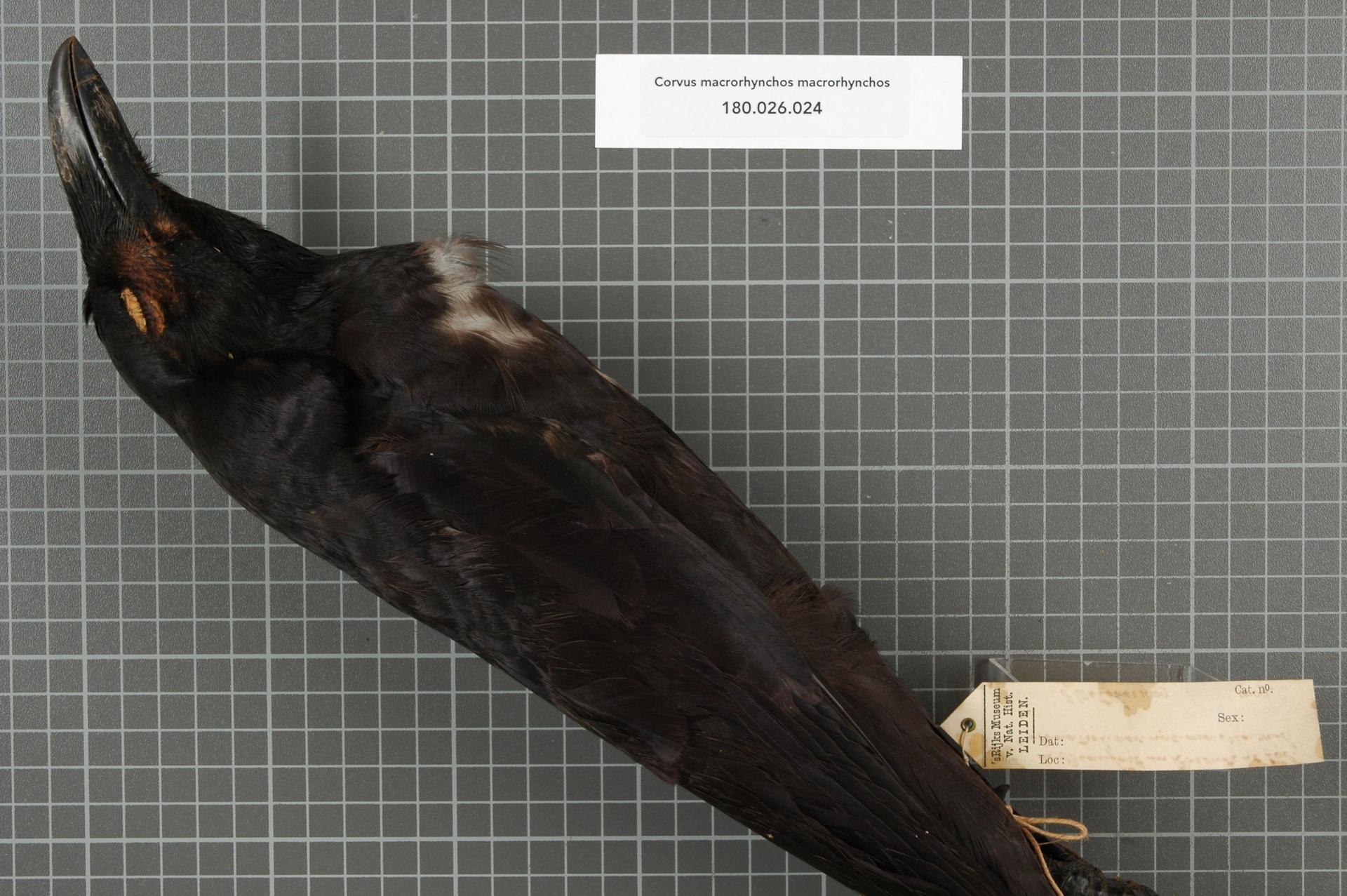 Corvus macrorhynchos macrorhynchos Wagler, 1827